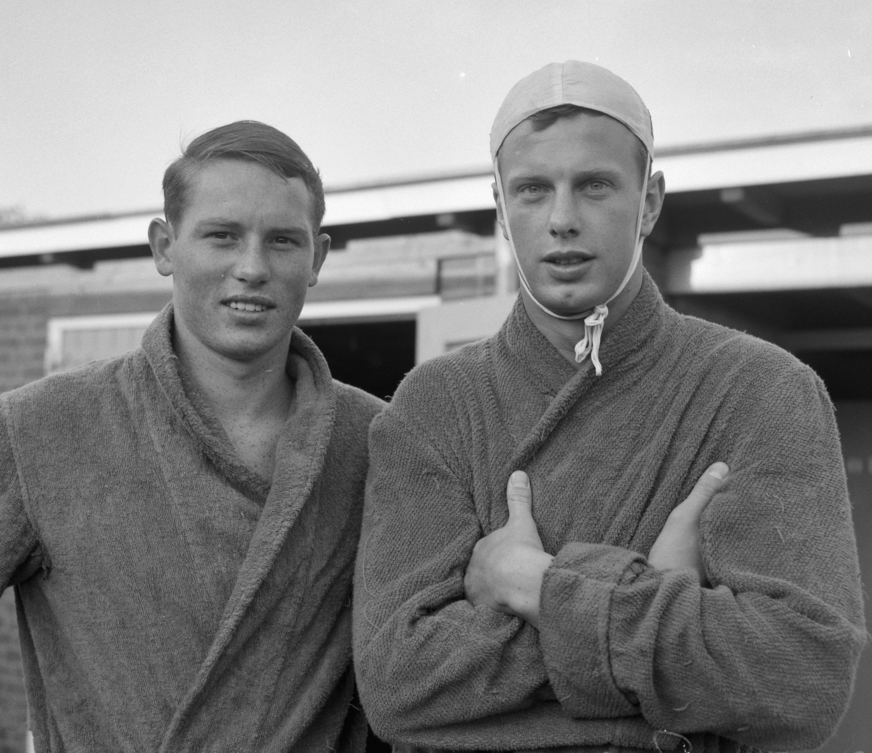 Waterpolotoernooi Nederland tegen Frankrijk. Leenaards en Havo Ran